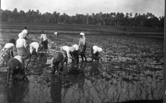 Foto. Het uitplanten van de bibit op een sawah op West Java